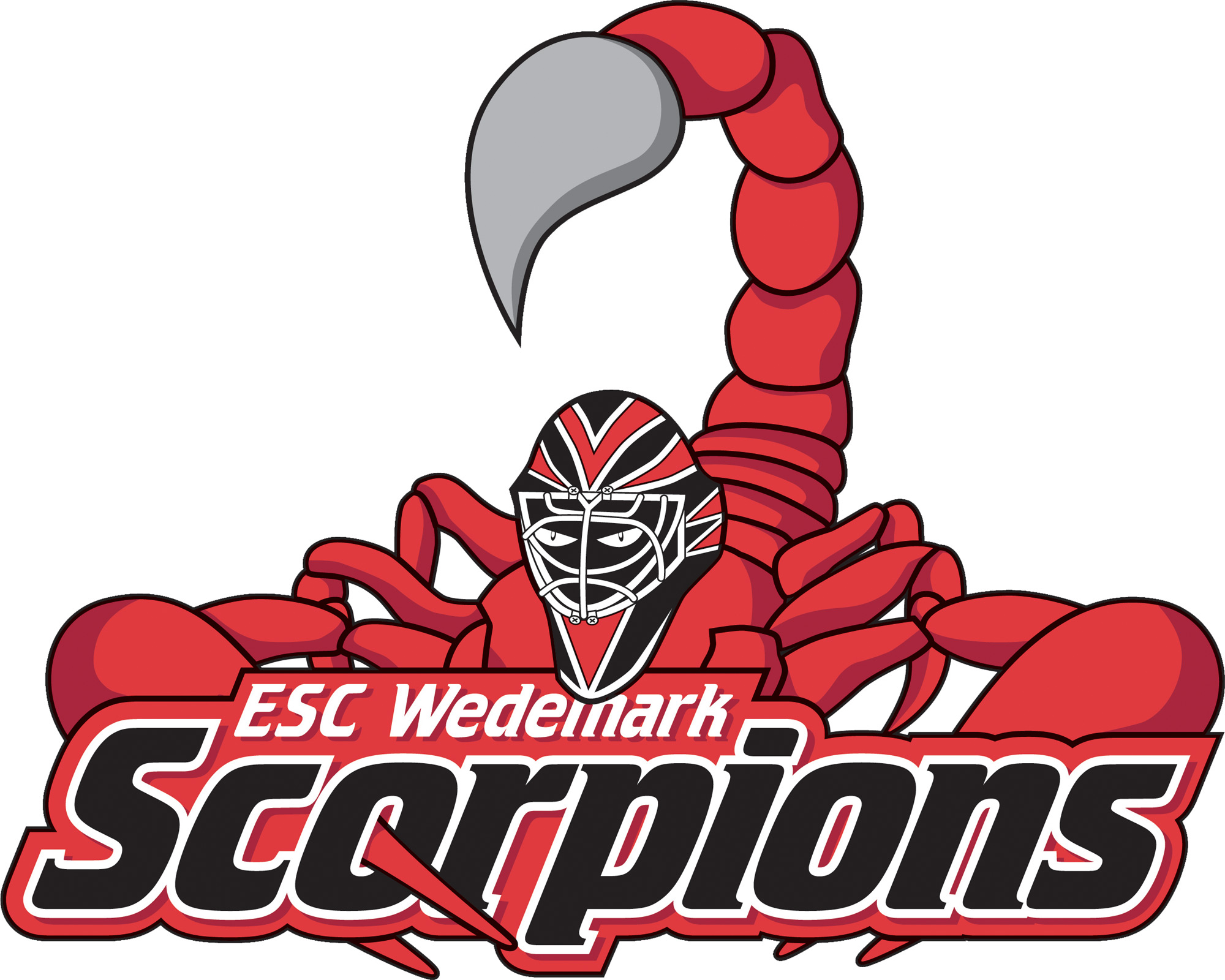 Offizielles Logo des ESC Wedemark-Scorpions e. V.